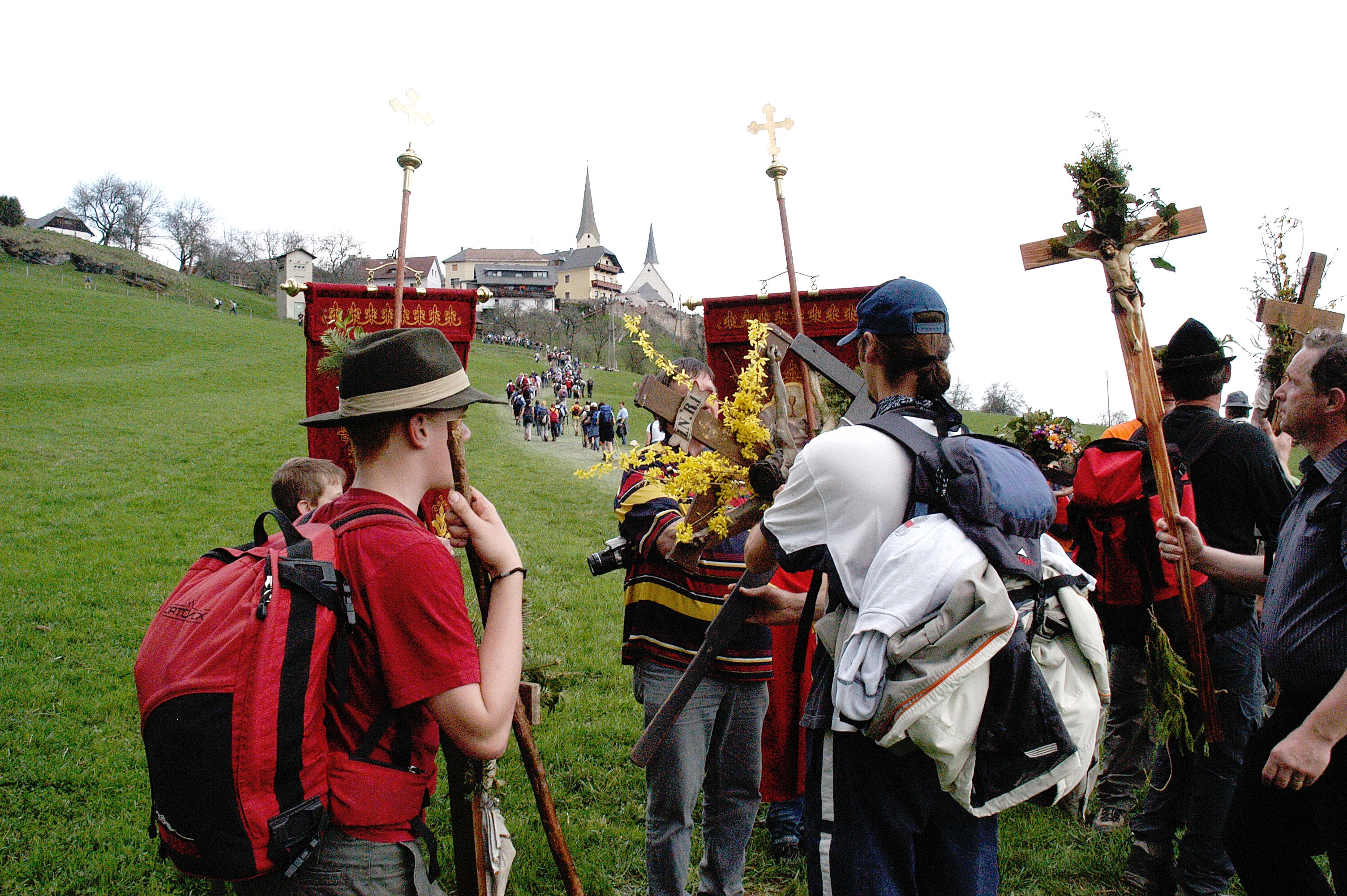 Kreuzbussen at the Vierbergelauf near Soerg, Carinthia, Austria